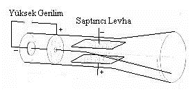 Thomson’ı elektronun keşfine götüren deney düzeneği